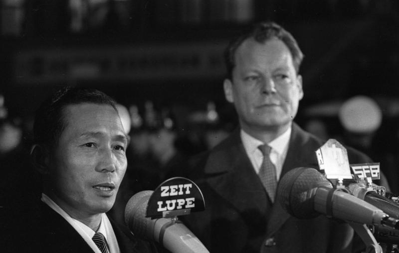 Berlin (West) Staatsbesuch Korea, General Park Ankunft: Flughafen Tempelhof (rechts: Willy Brandt)